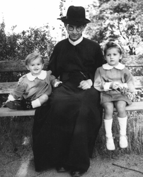 Tuším, že jsou to neteře.